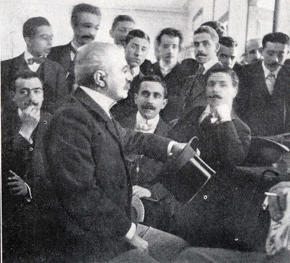 Miguel Bombarda Dr. Miguel Bombarda no segundo julgamento sobre abuso de liberdade de imprensa em Lisboa (1907)